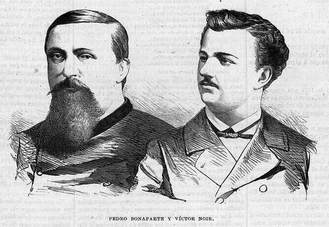 Pedro Bonaparte y Víctor Noir, en la revista La Ilustración de Madrid.